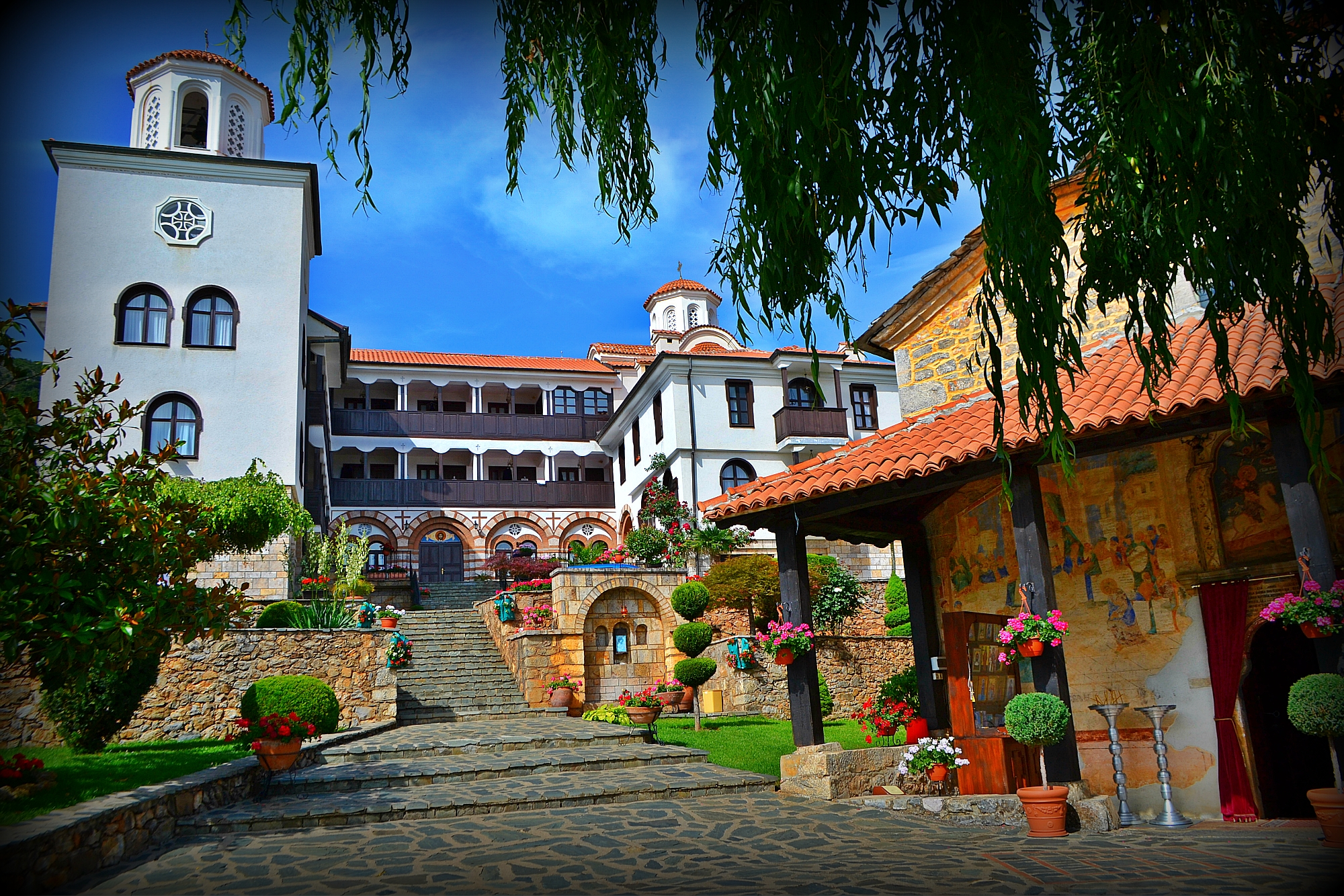 Манастир Св. Ѓорѓи Победоносец – Рајчица